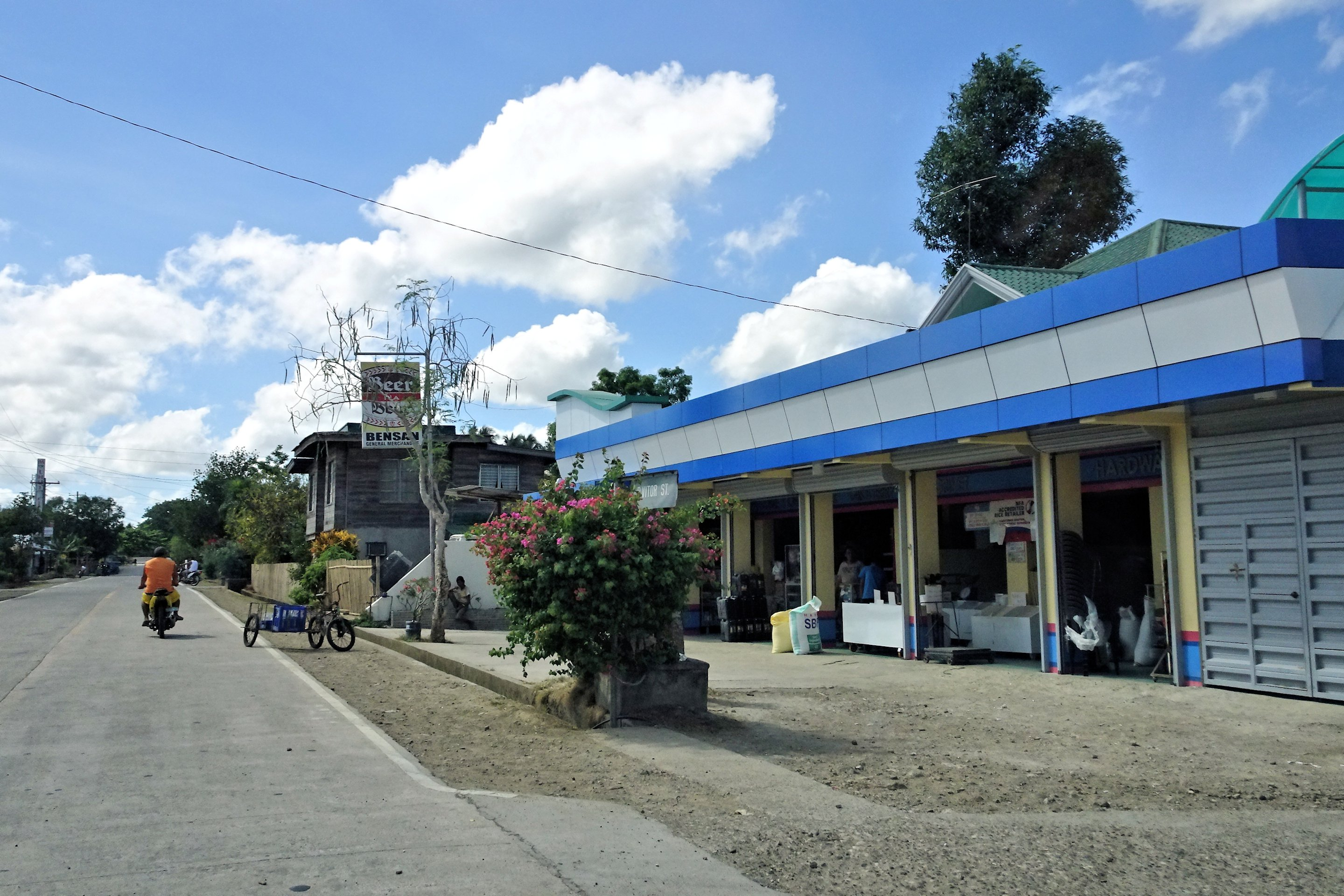 Danao, Bohol, Philippines